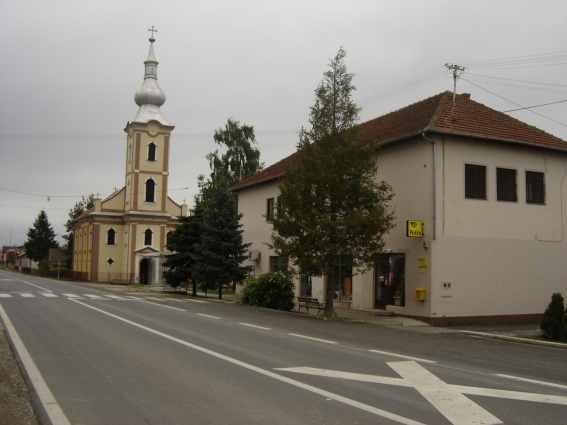 Baranjsko Petrovo Selo, župna crkva sv. Lovre đakona mučenika i Dom kulture